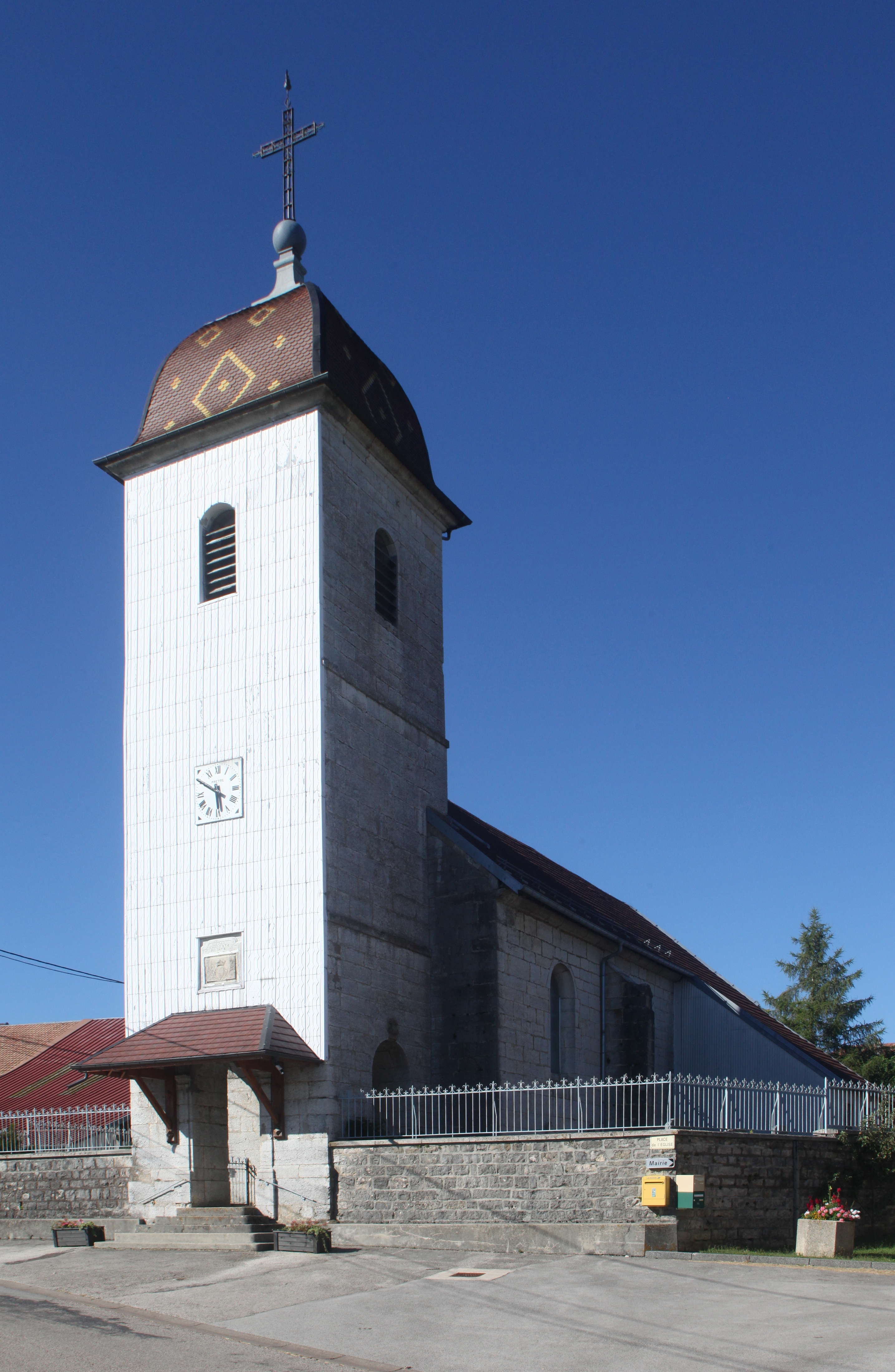 Église de Chevigney-les-Vercel (Doubs).